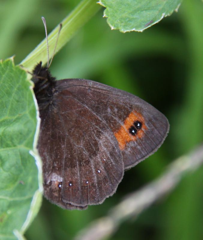 Erebia aethiops Slovenia - Triglavski narodni park NP